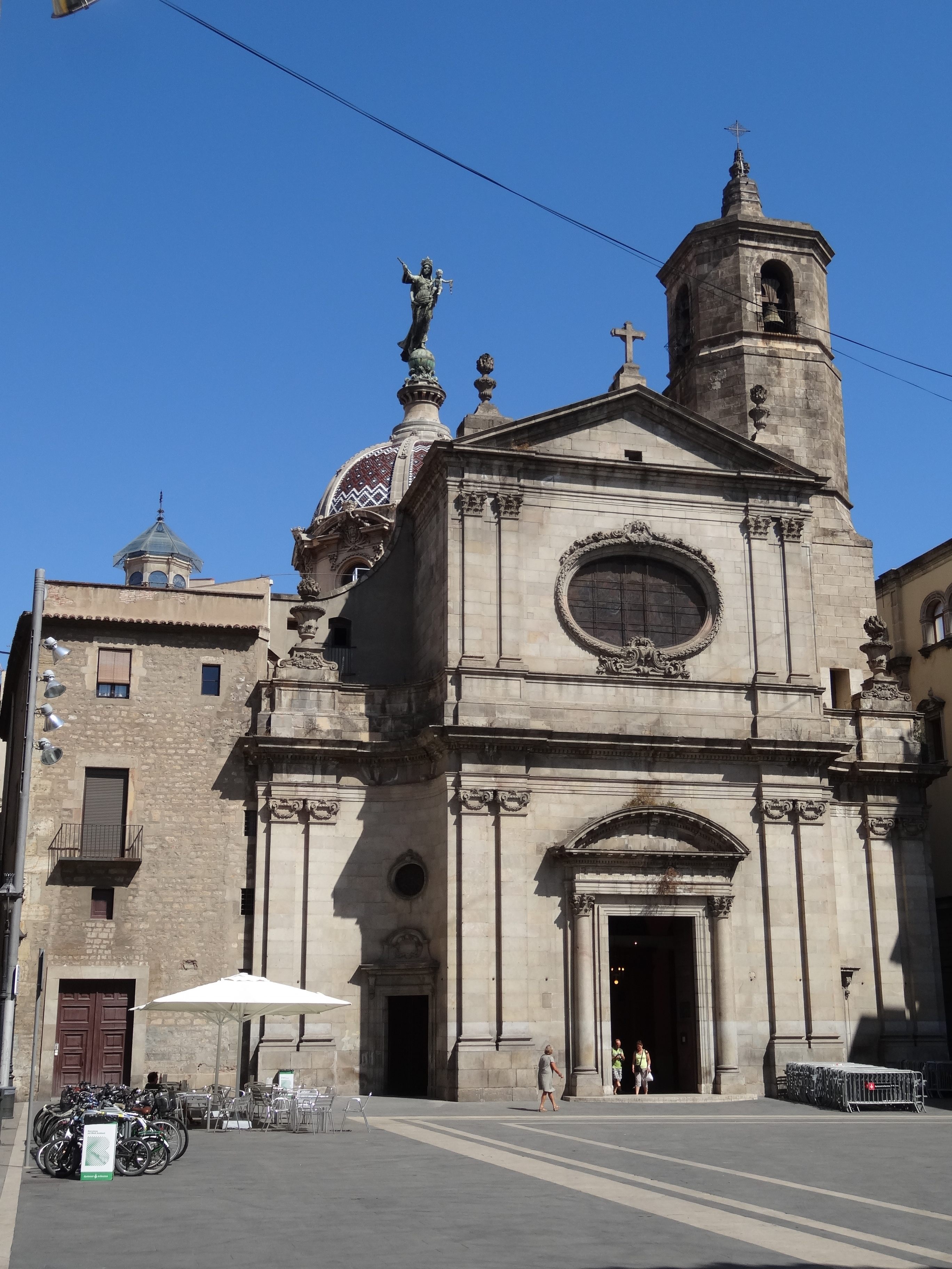 Basilica de la Mercè. Plaça de la Mercè (Barcelona)